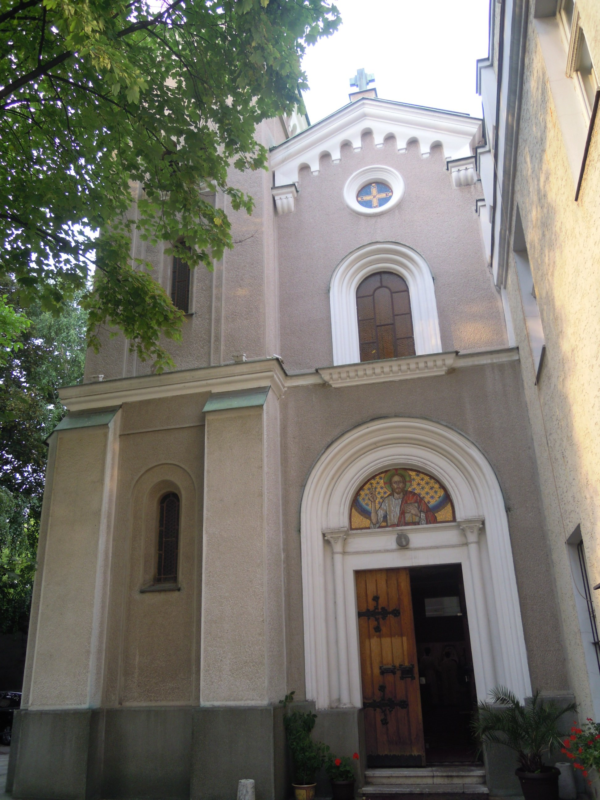 La facciata della Chiesa Concattedrale di Cristo Re a Belgrado, Serbia. A sinistra il campanile, a destra, invece, la canonica.